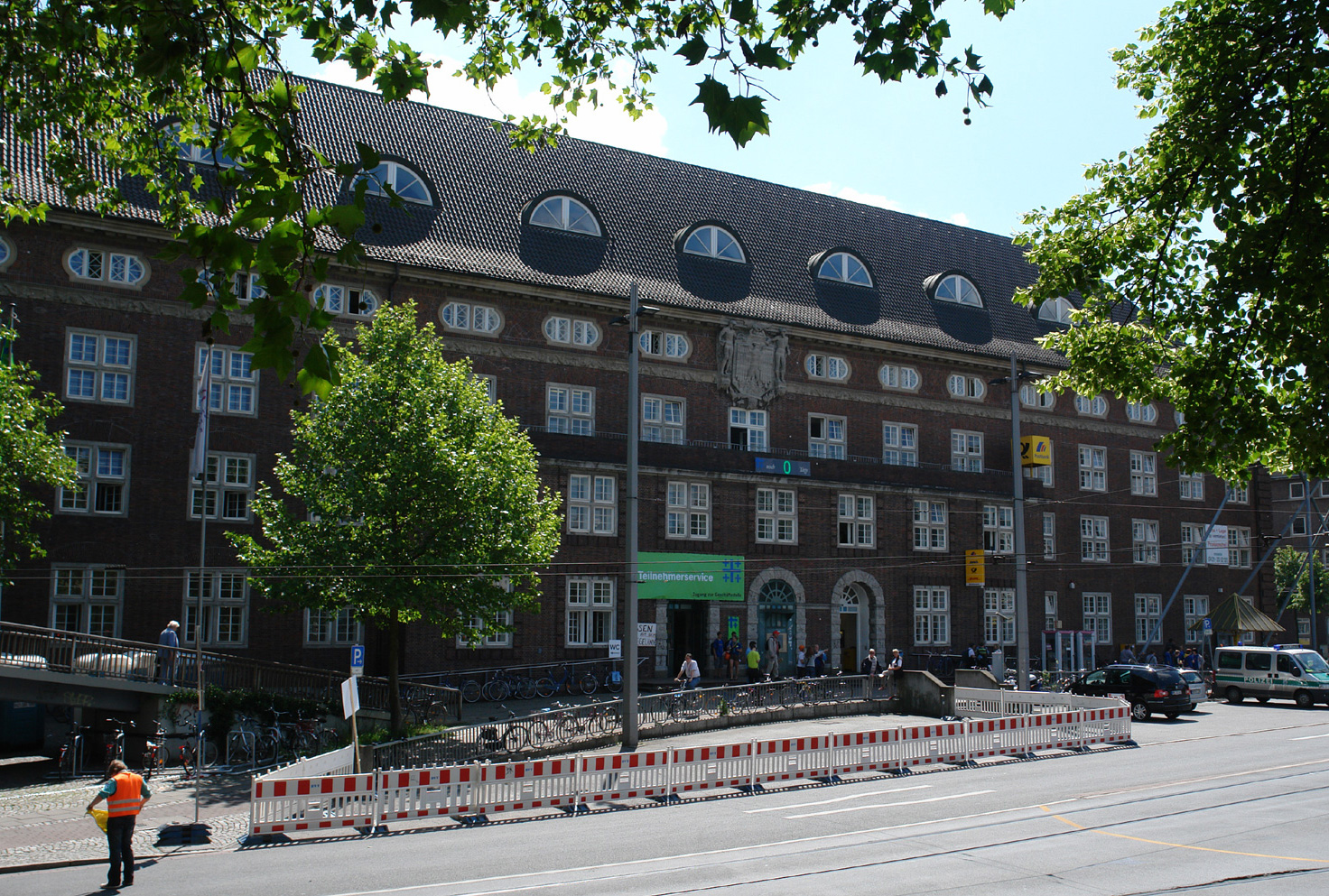 Postamt am Hauptbahnhof: Kirchentagsbüro am 32. Ev. Kirchentag 2009 in Bremen Das abgebildete Objekt ist ein geschütztes Kulturdenkmal in der Freien Hansestadt Bremen, mit der Nr. 0102 beim Landesamt für Denkmalpflege registriert.